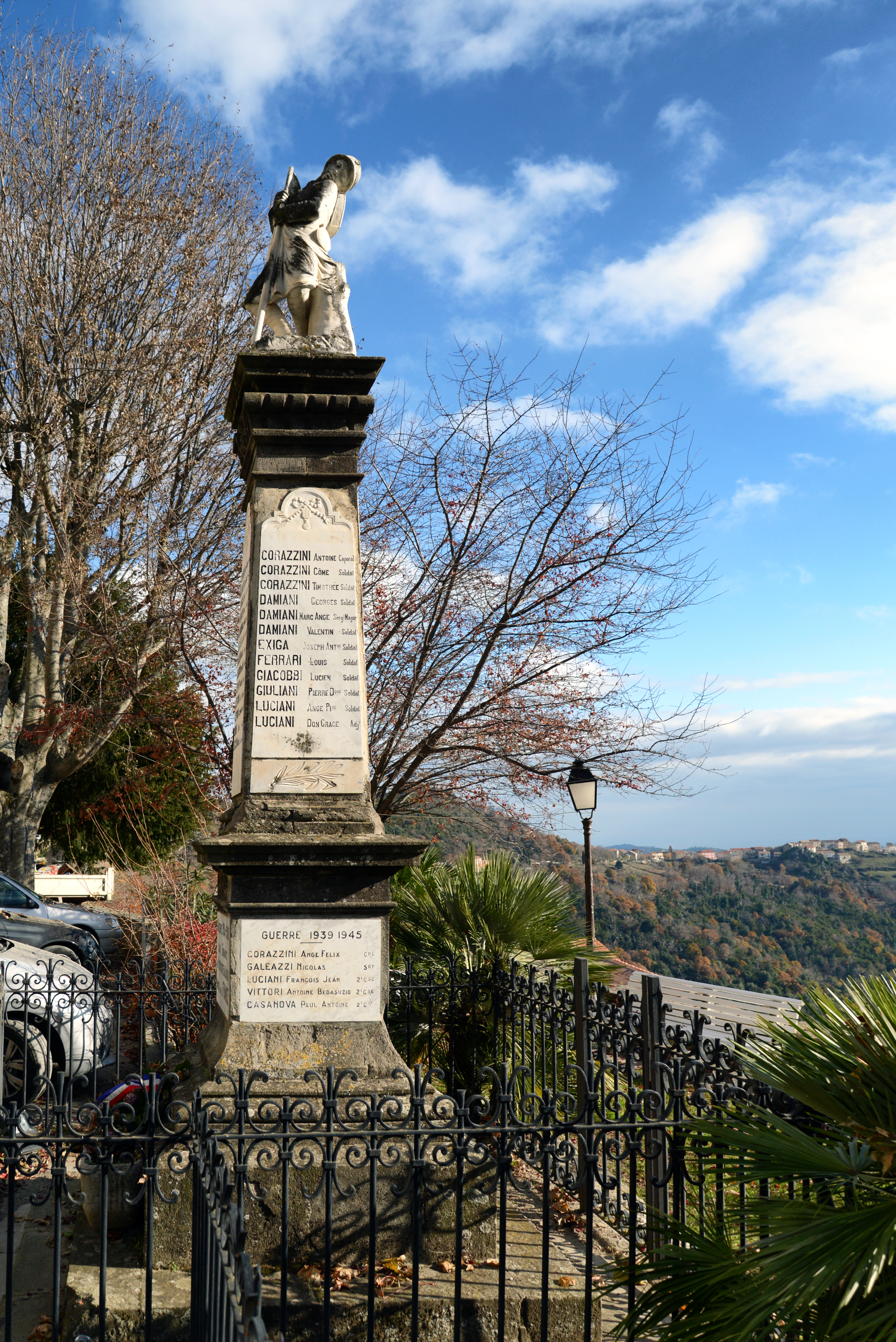 Piedicorte-di-Gaggio, Rogna (Corse) - Monument aux morts